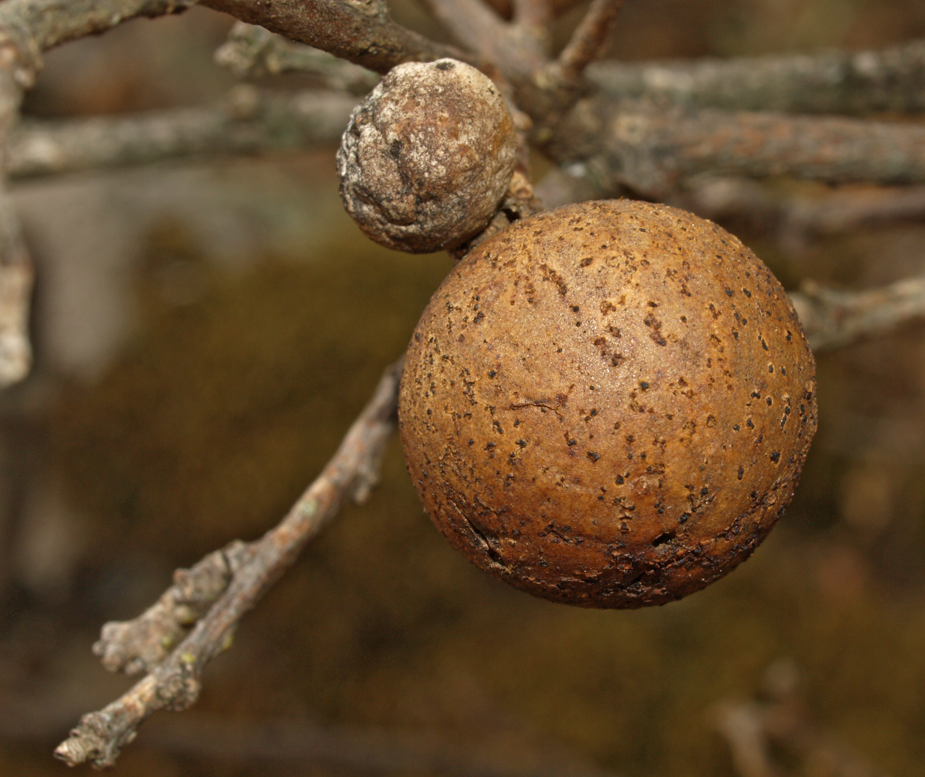 Agallas sobre Quercus pyrenaica, probablemente de Andricus kollari-A. hispanicus. Losar de la Vera (Cáceres, España).